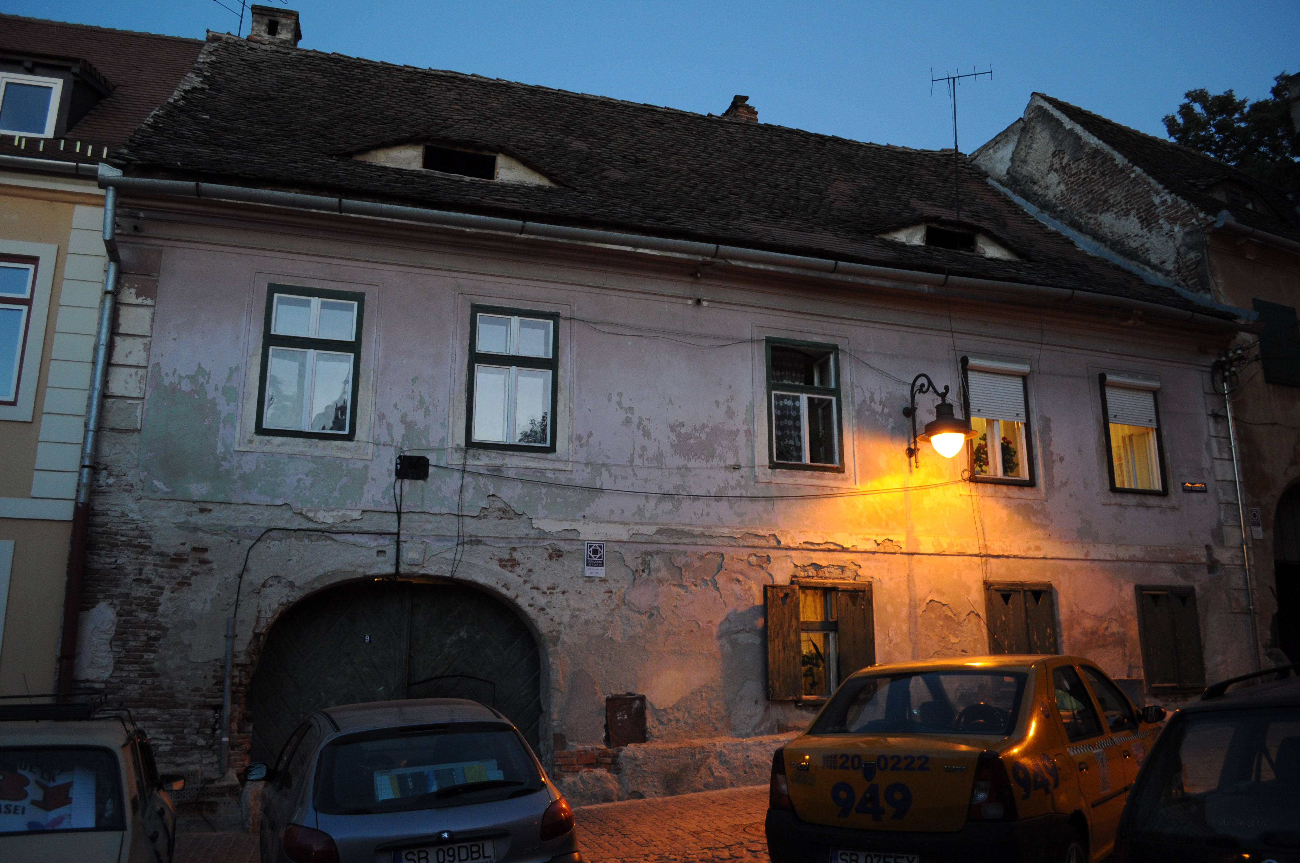 Casa - vedere frontala, Piața Aurarilor 9